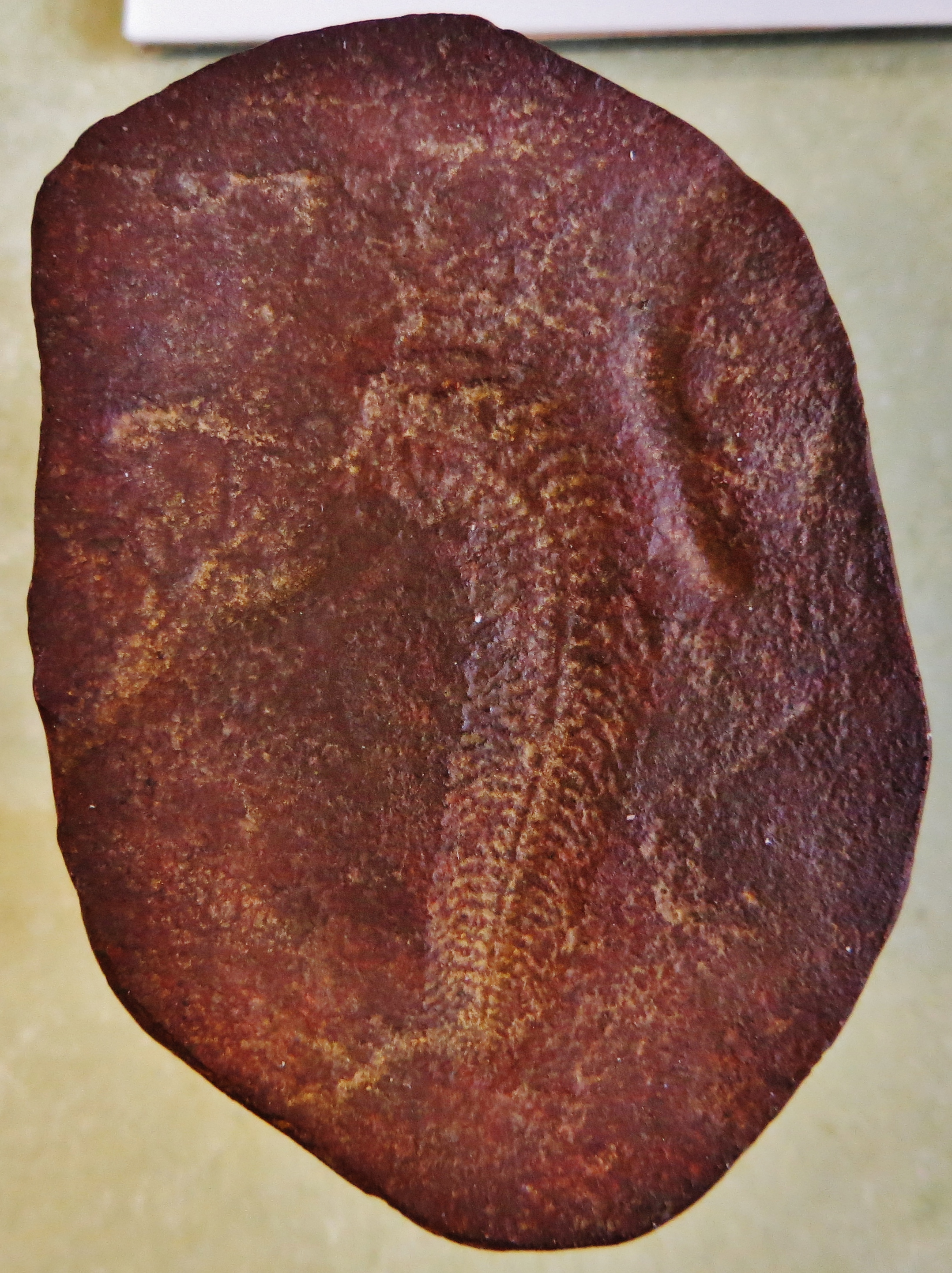 Fossil - Took the picture at Natural History Museum, Bonn University